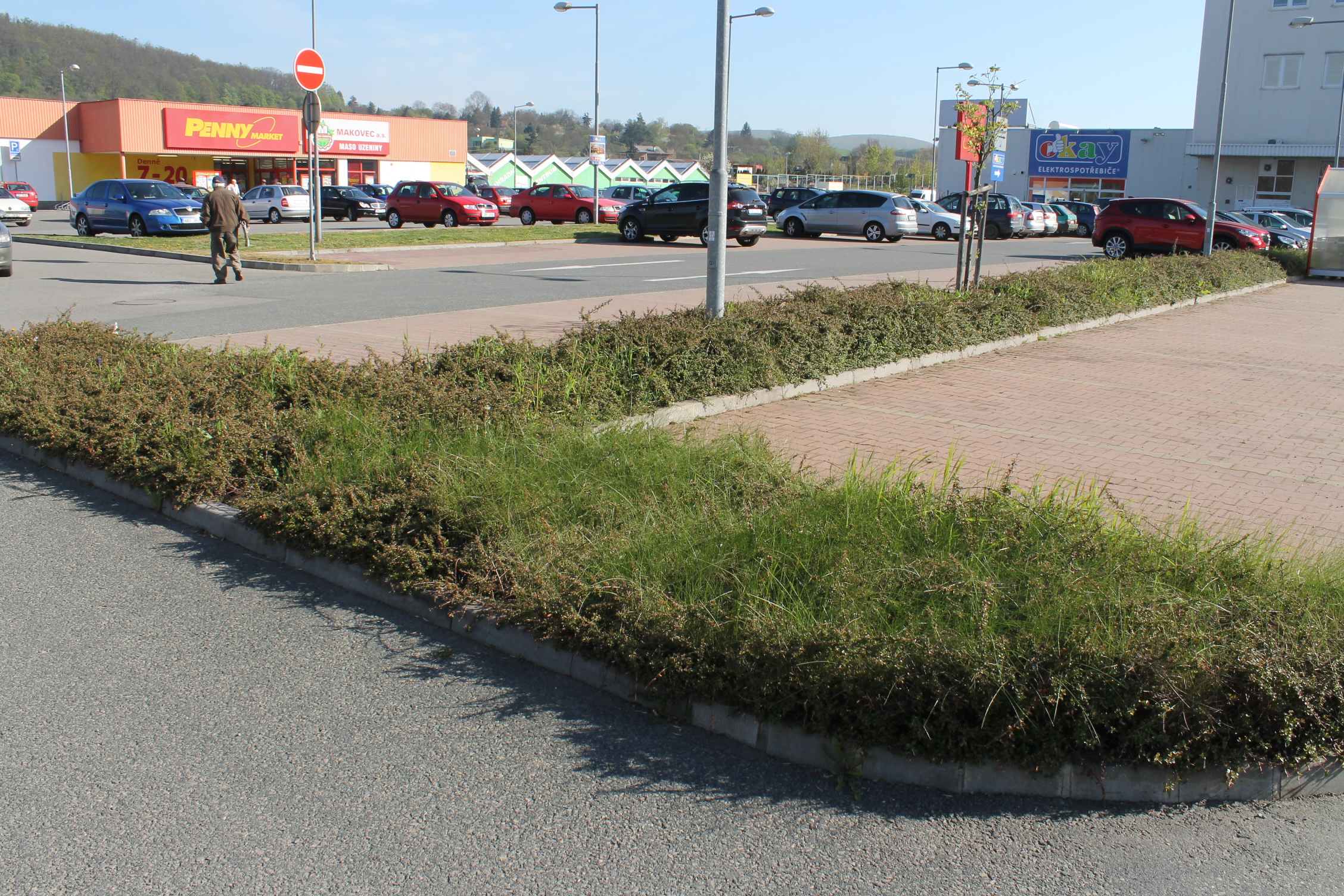 Skalník Cotoneastered. Skogholm, t.č. zaplevelený